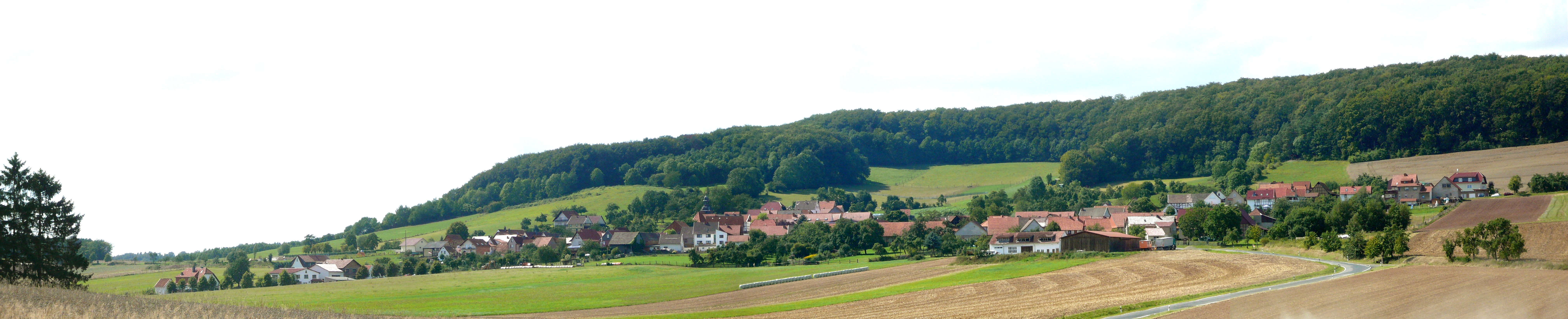 Blick von Osten auf Rohrberg, Landkreis Eichsfeld, Thüringen. Hinten der Mädchenberg (Bildmitte) und der Rohrberg (rechts). Panoramaaufnahme